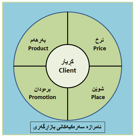 ادوات تسویق